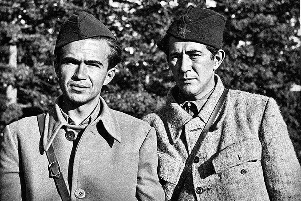 Srpskohrvatski / српскохрватски: Ivo Lola Ribar i Milovan Đilas